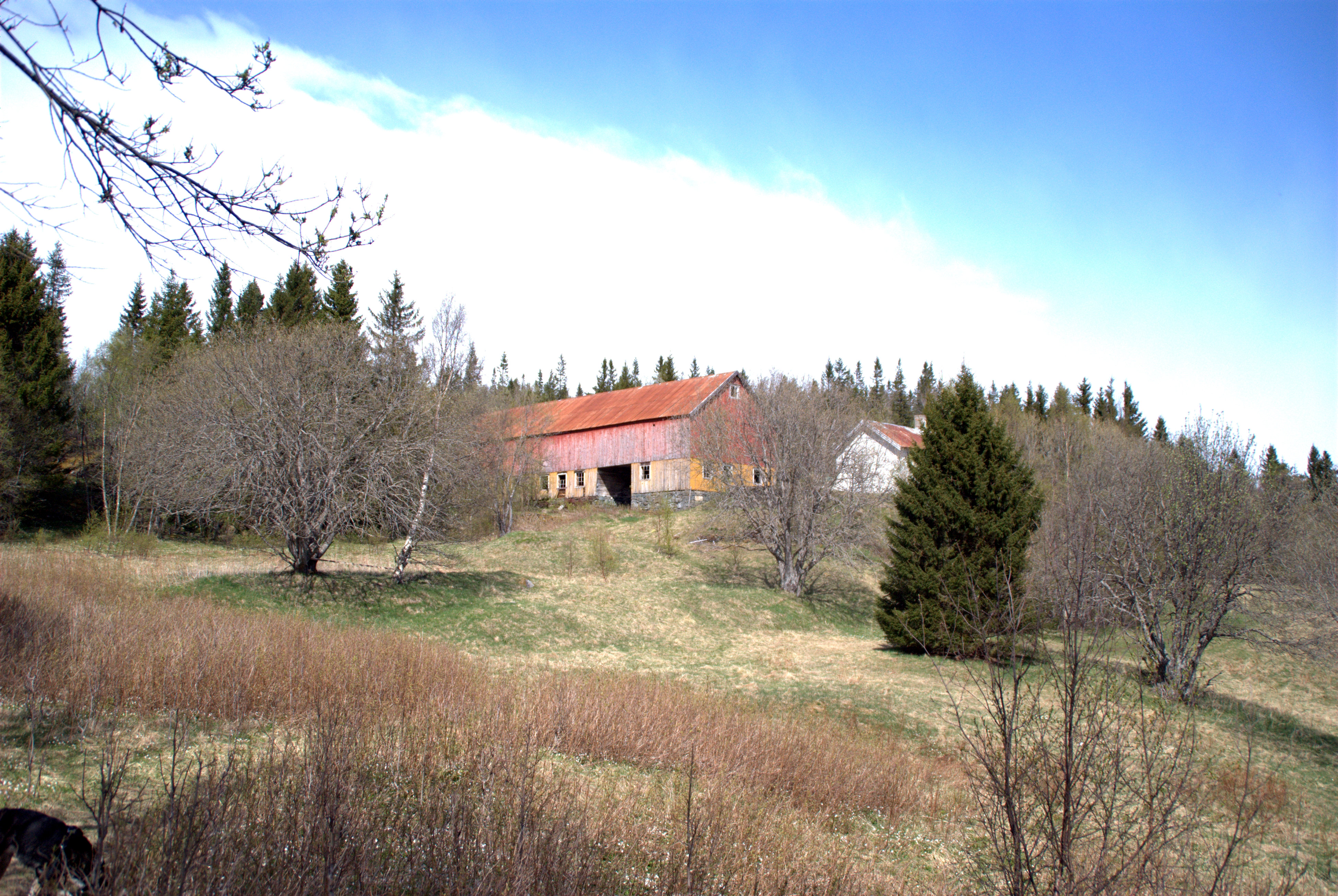 Holstvollen nord i Bymarka i Trondheim.